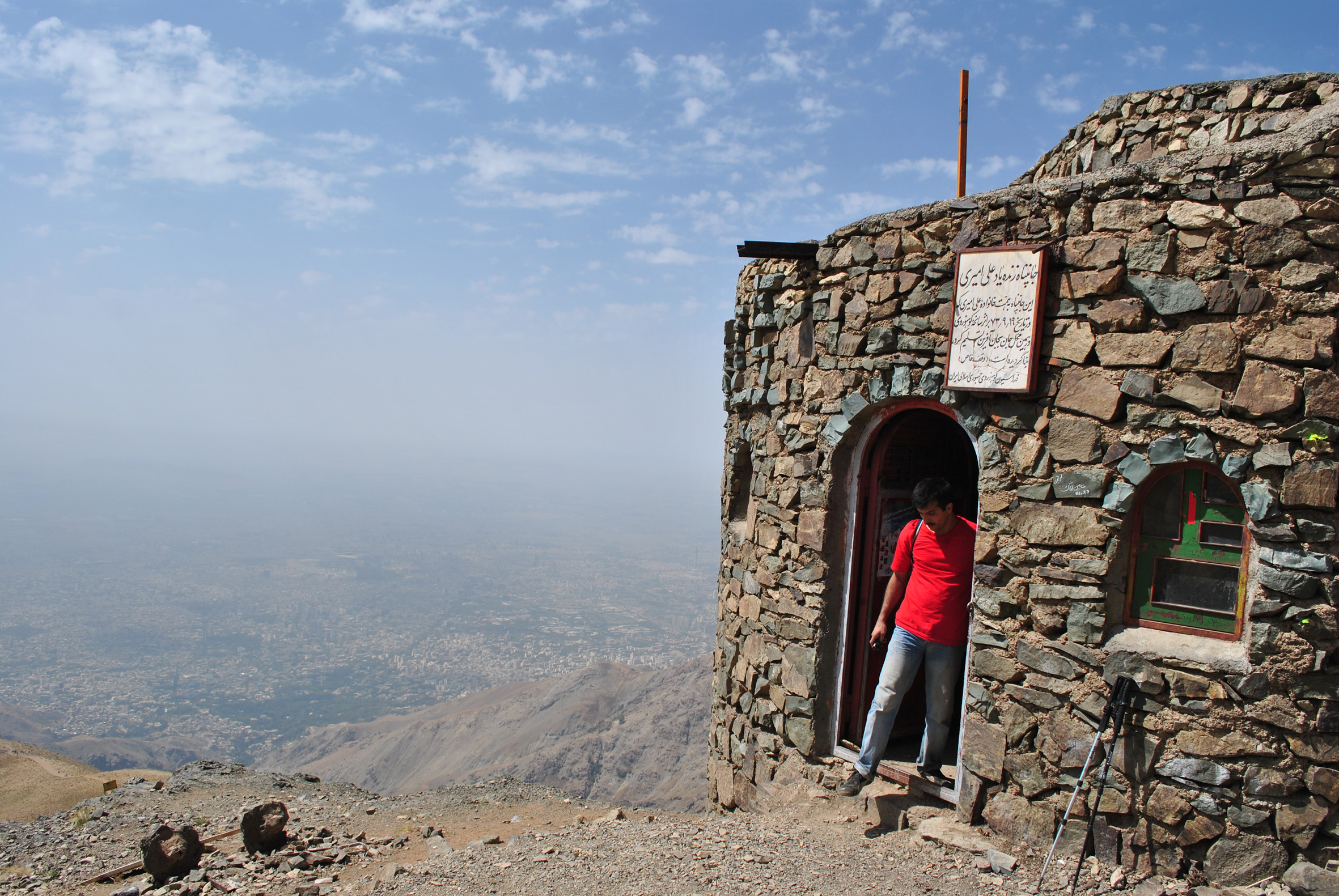 جان‌پناه سیاه‌سنگ در مسیر کوهنوردی شیرپلا به قله توچال